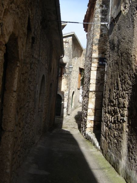 Fontana Liri superiore